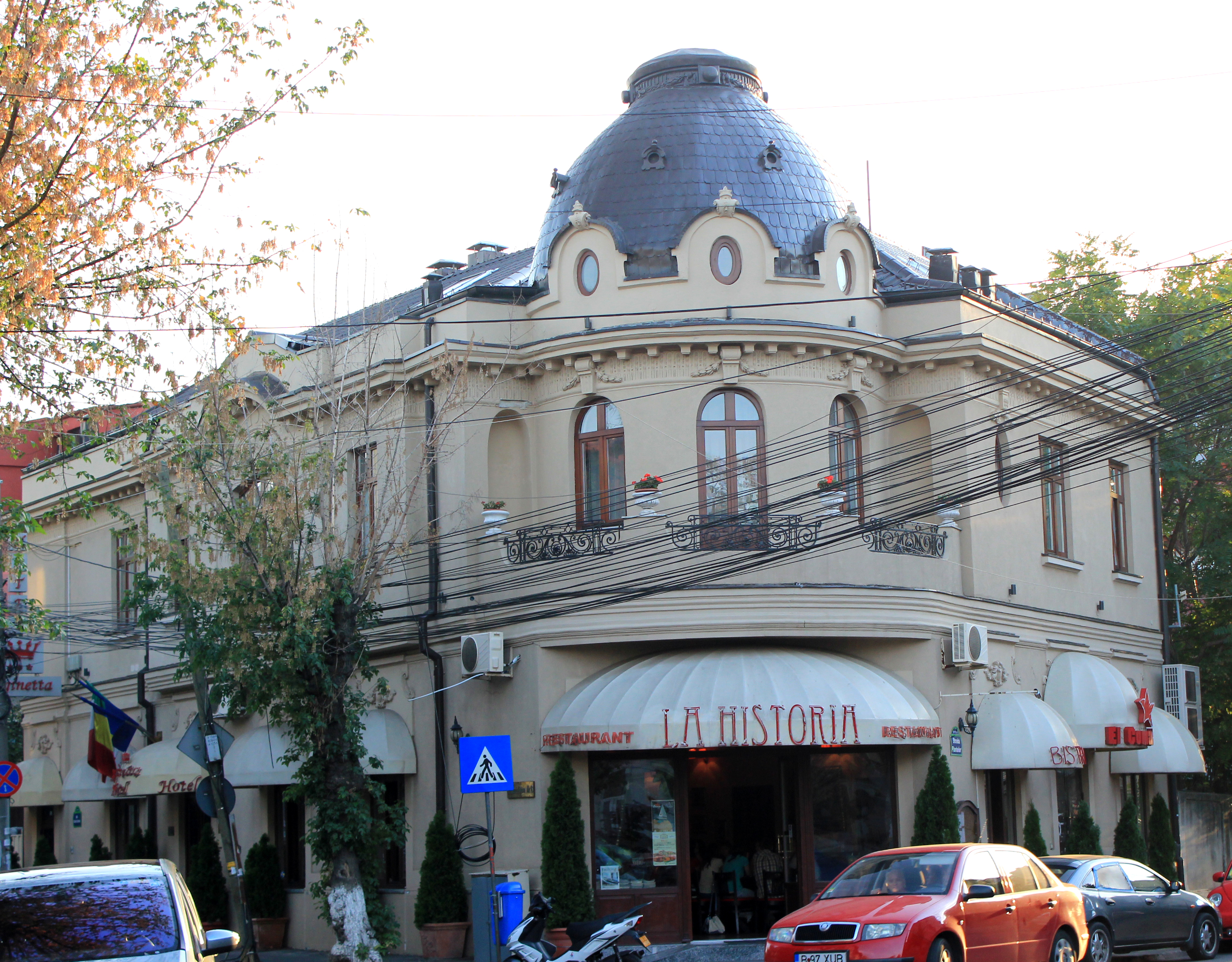 Casa Cerchez P-ta Sf. Stefan 13A